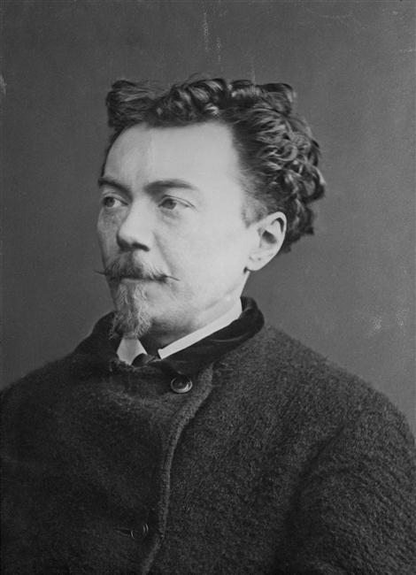 Auguste de Villiers de L'Isle-Adam (1838-1889)